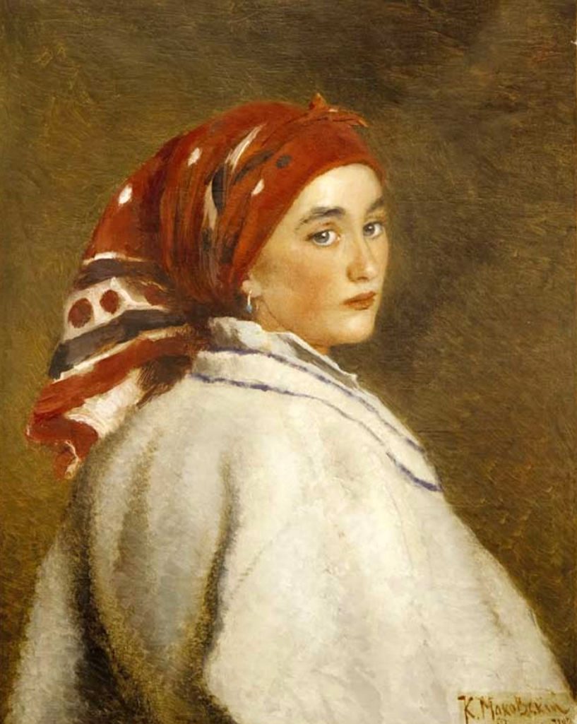 1883 року митець придбав у княгині Абамелек-Лазарєвої маєток Рясники (нині село Гощанського району Рівненської області) і провів там півтора літніх місяці, щоправда, через непорозуміння з колишньою власницею, відмовився від придбання. Портрет намальований під час недовгого побуту Маковського в цьому маєтку.